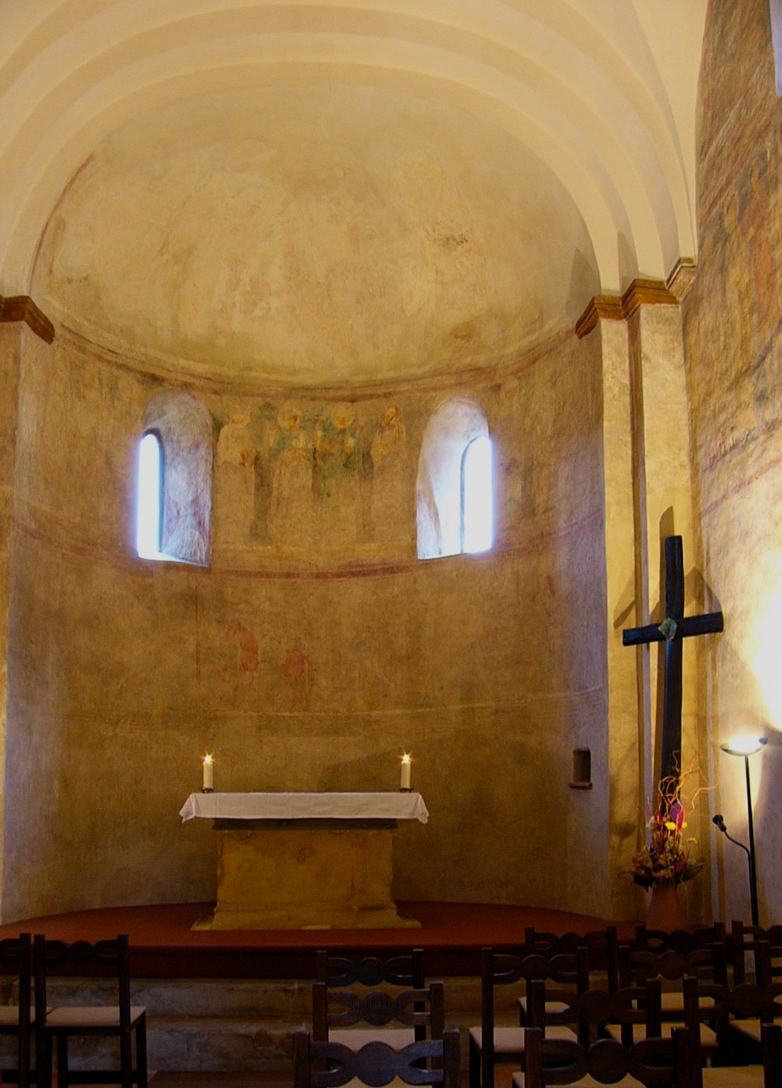 Interiér Kostela svatého Klimenta ve Staré Boleslavi